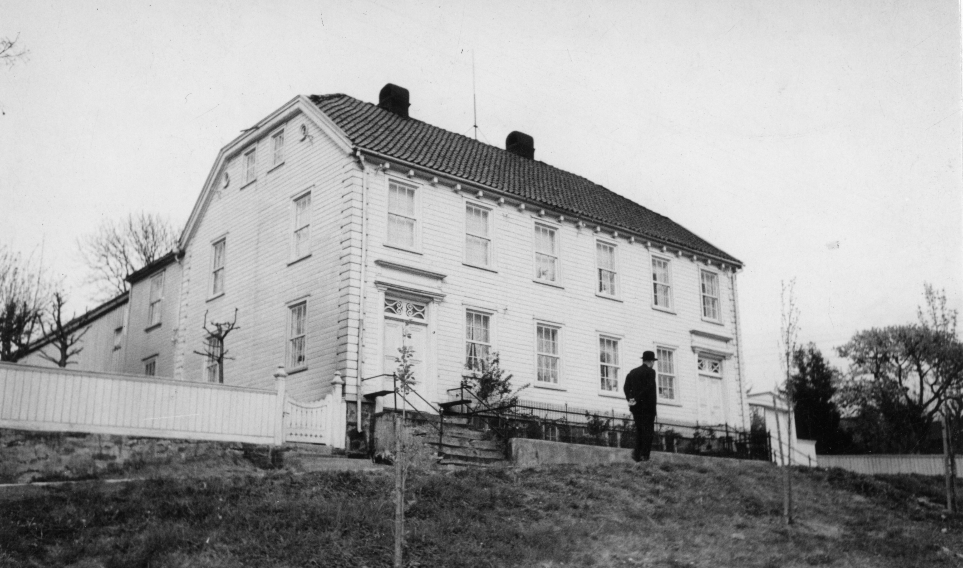 Konsul Hansens hus, S. N. Hansen-Gården i Lillesand, Aust-Agder This image on crowdsourcing geotagging platform Fotodugnad